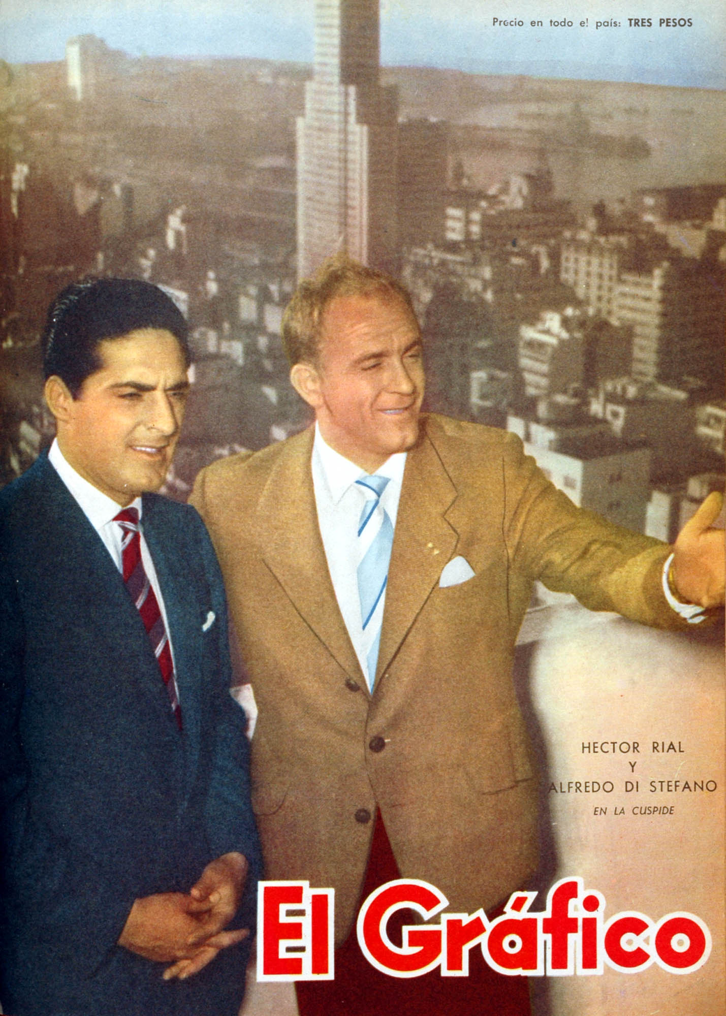 El Grafico del 15 de Agosto de 1958. Edicion 2031